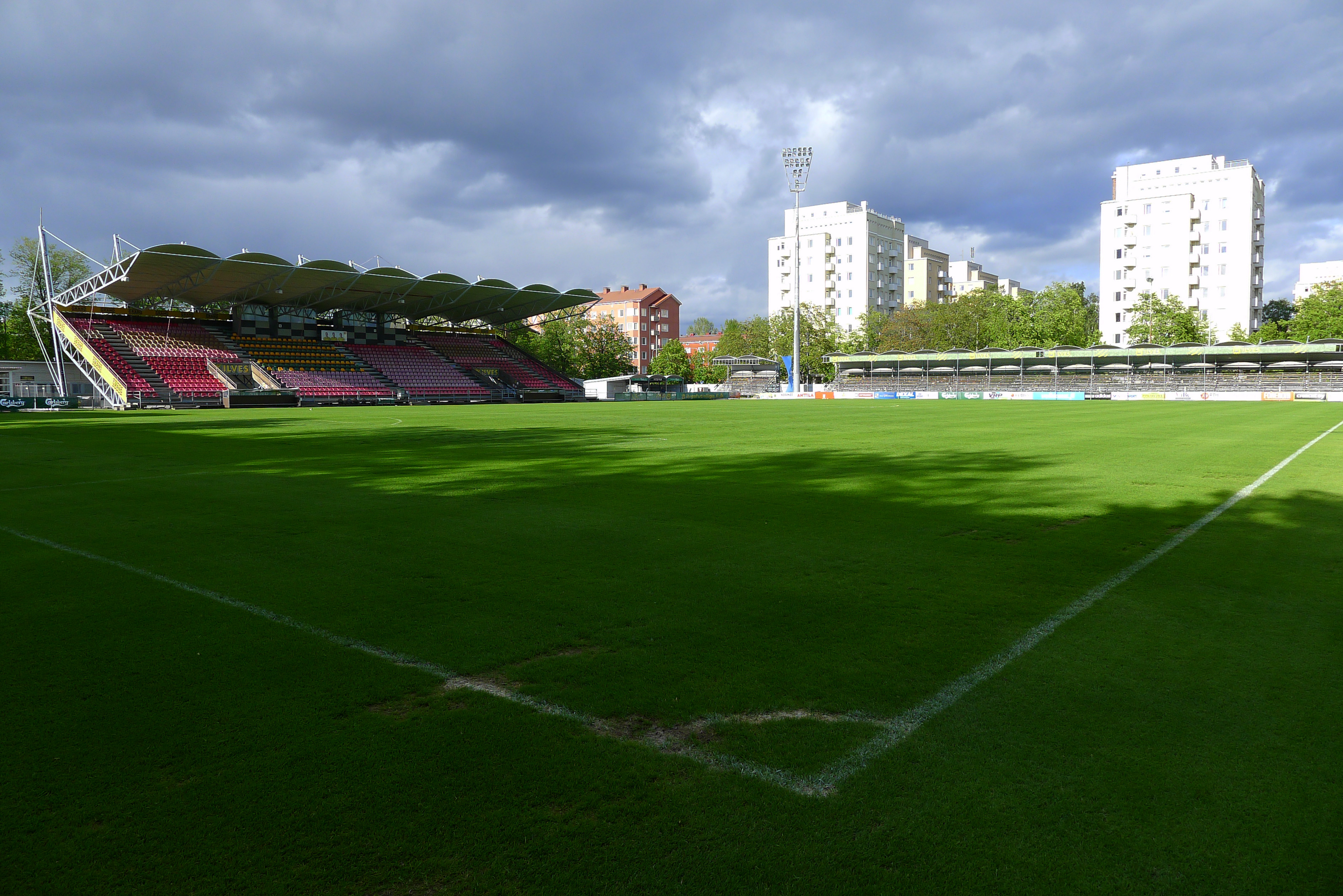 Tammelan stadion 4.6.2015